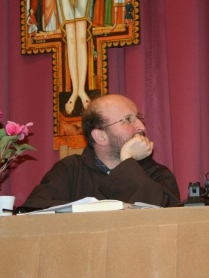 P. Gianluigi Pasquale al Simposio Laurentiani